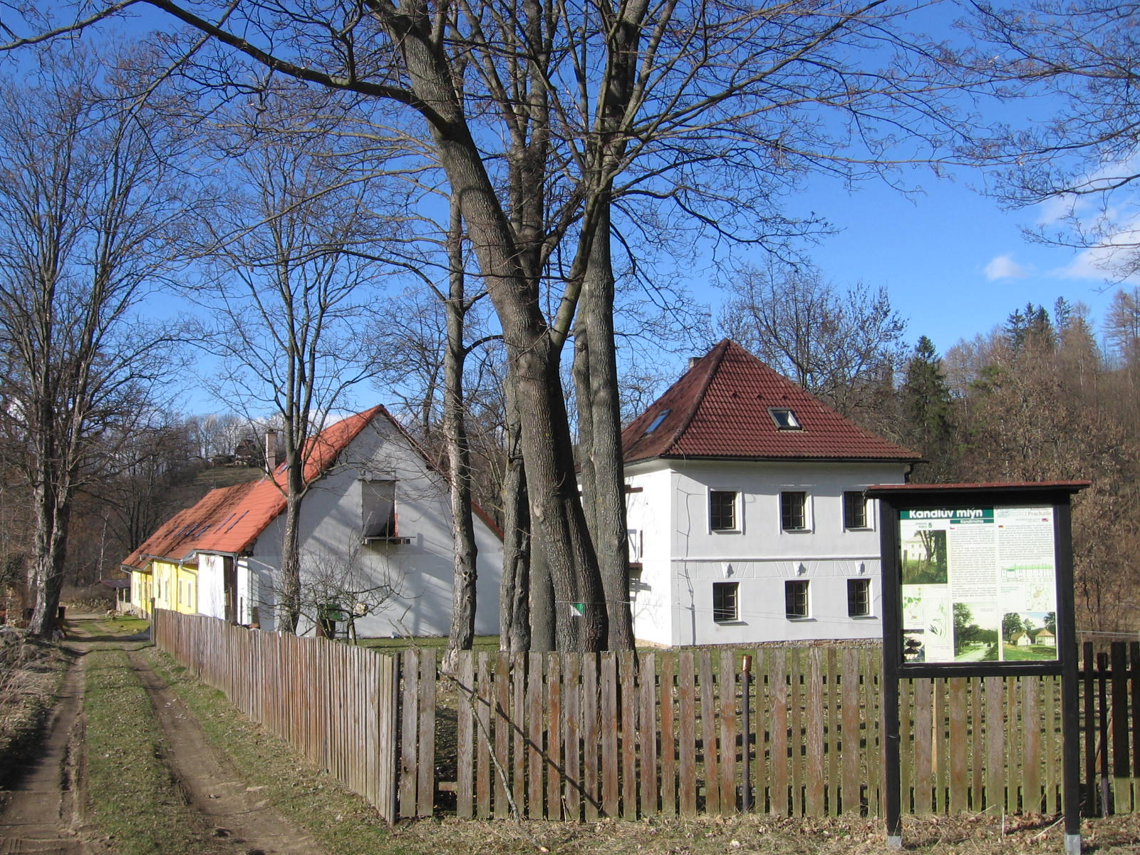 Kandlův mlýn u Prachatic a jeho okolí, rekreační středisko v bývalém mlýně pod Libínem